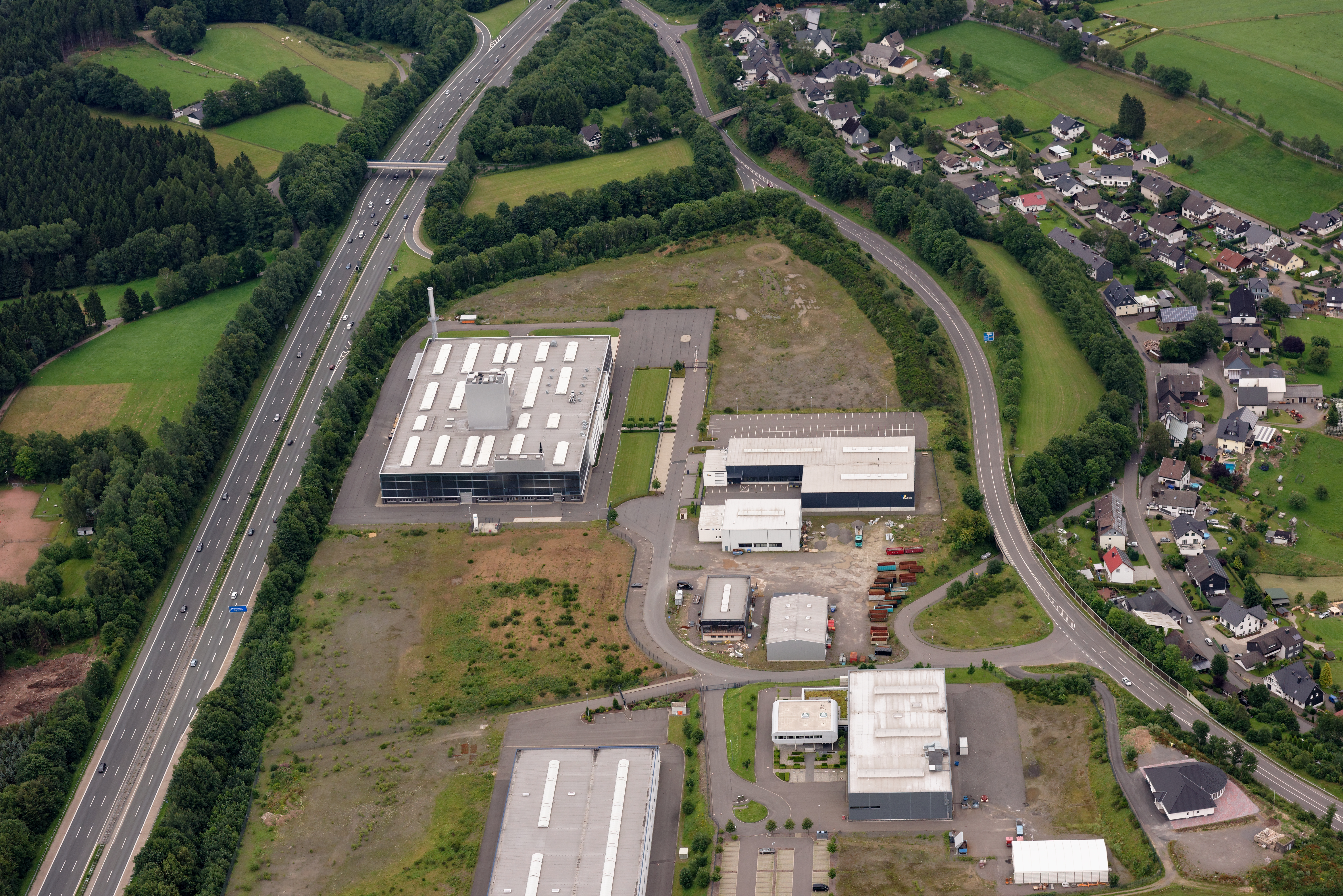 Luftaufnahme: Drolshagener Ortsteil Germinghausen; Bundesautobahn 45 und Landesstraße 708; dazwischen Gewerbegebiet Buchholz, Nordrhein-Westfalen